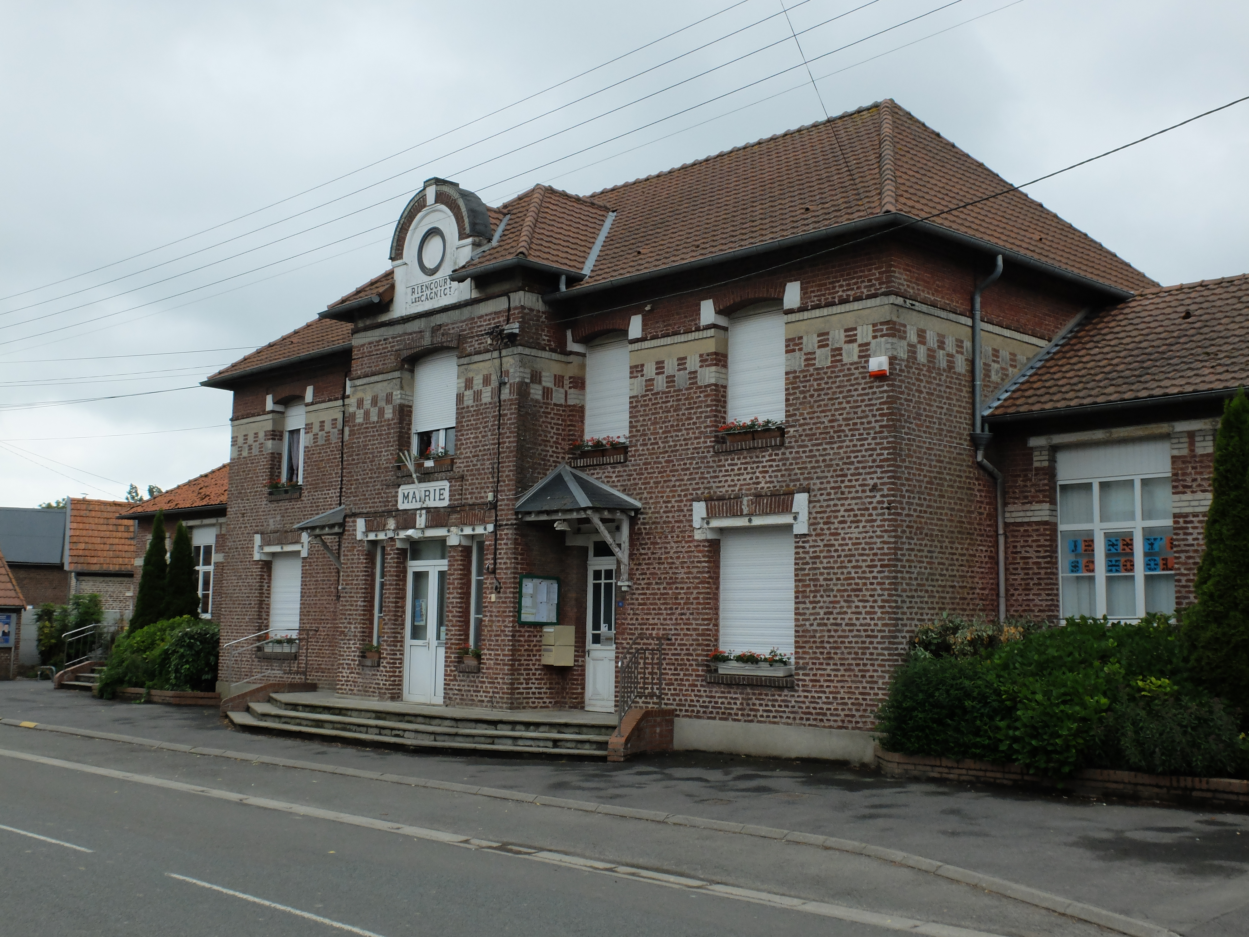 Vue de la mairie de Riencourt-lès-Cagnicourt.